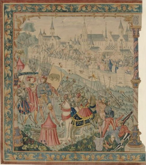 Asedio de Dijon (1513), parte izquierda del tapiz de escuela flamenca encargado en 1515 por Philibert Godran para conmemorar el suceso.